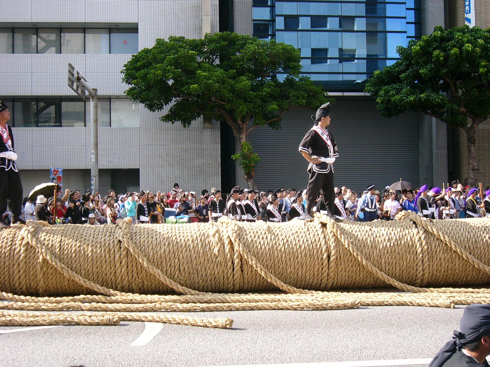 Naha Matsuri Giant tug rope